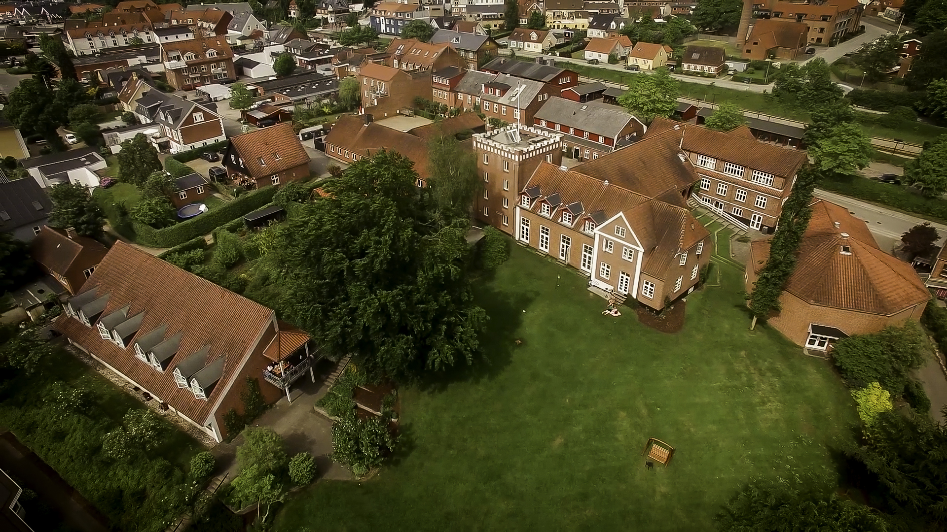 Ry Højskole i maj 2016 med stationen og Ry by i baggrunden